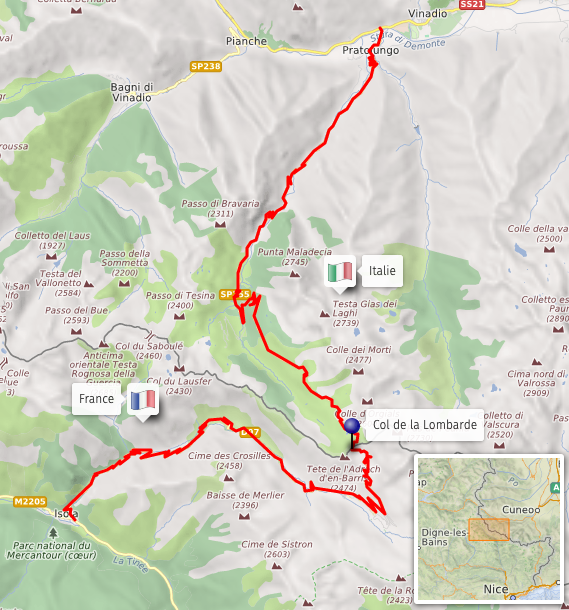 Carte d'après openstreetmap